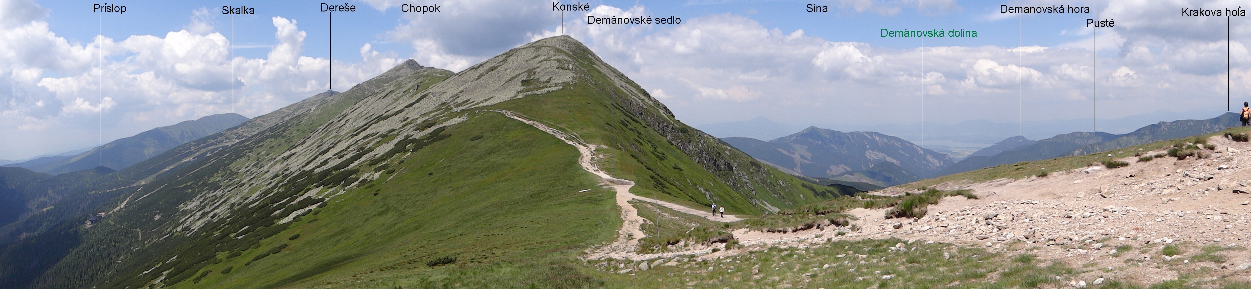 View from Demänovské sedlo